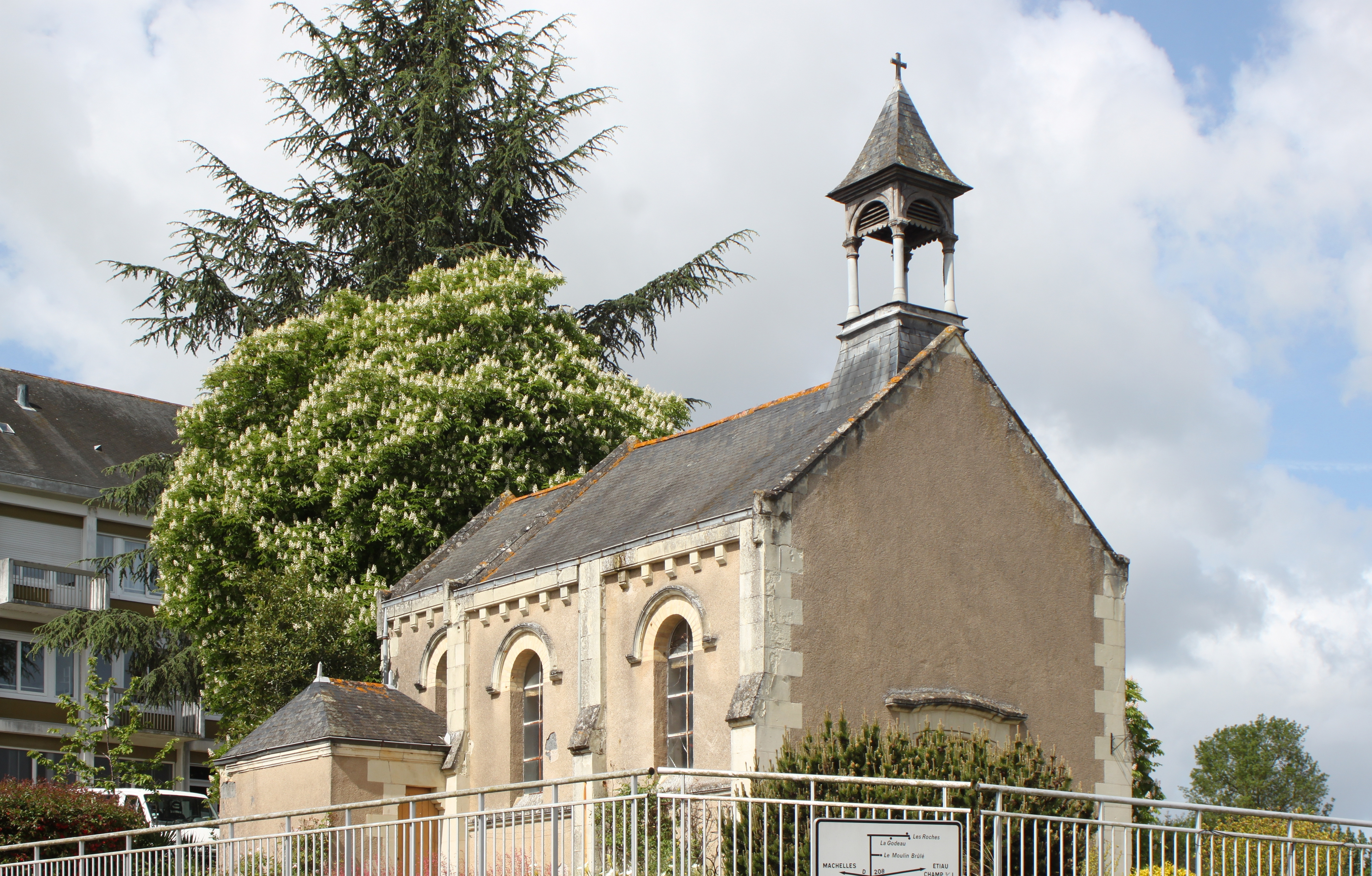 Chapelle de la maison de retraite, les Ponts, Fr-49-Thouarcé.